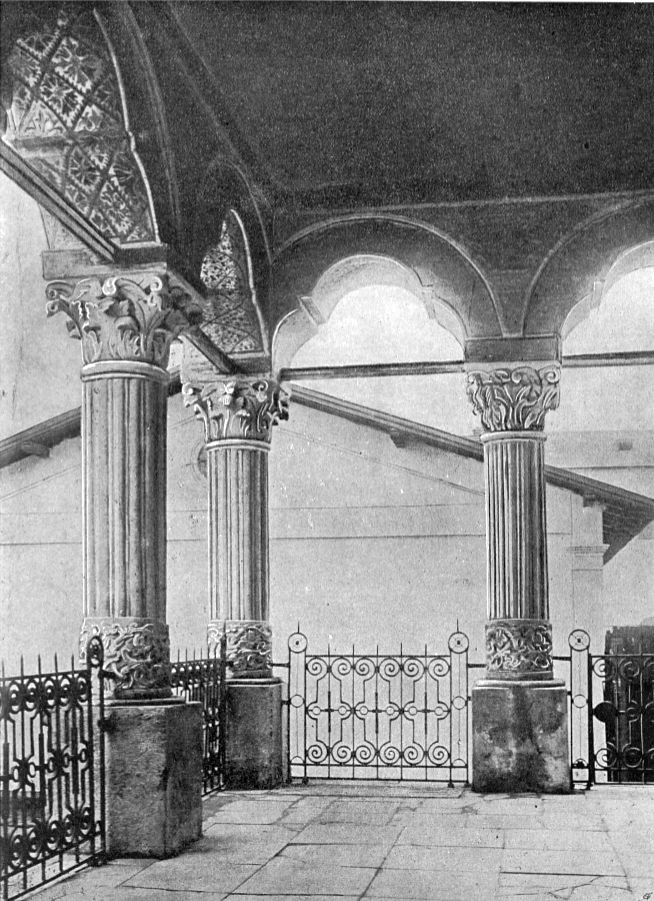 Foișor la Biserica Văcărești